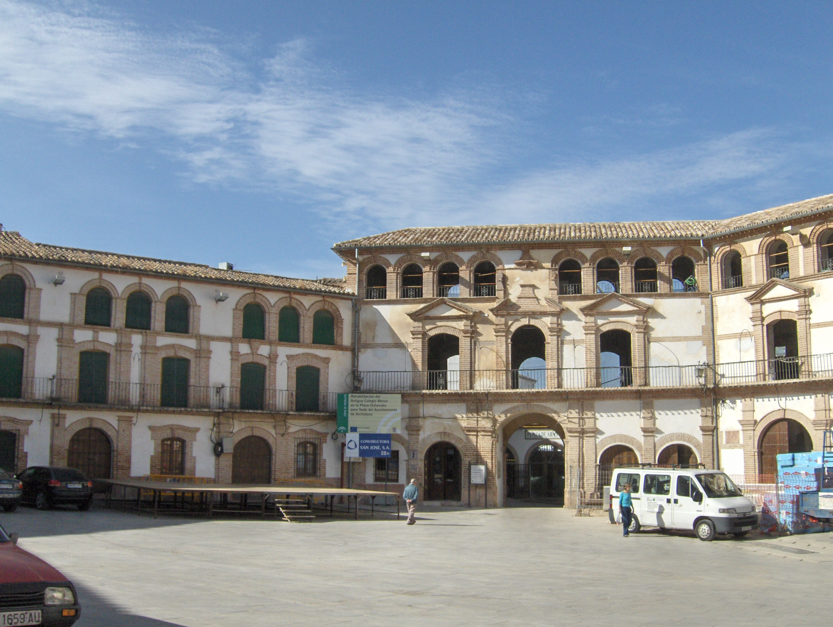 Plaza Ochavada de Archidona, Málaga, España.